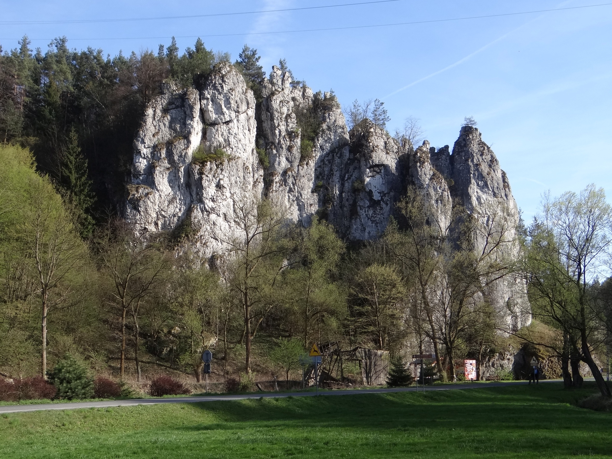 Skały Łamańce w Ojcowskim Parku Narodowym